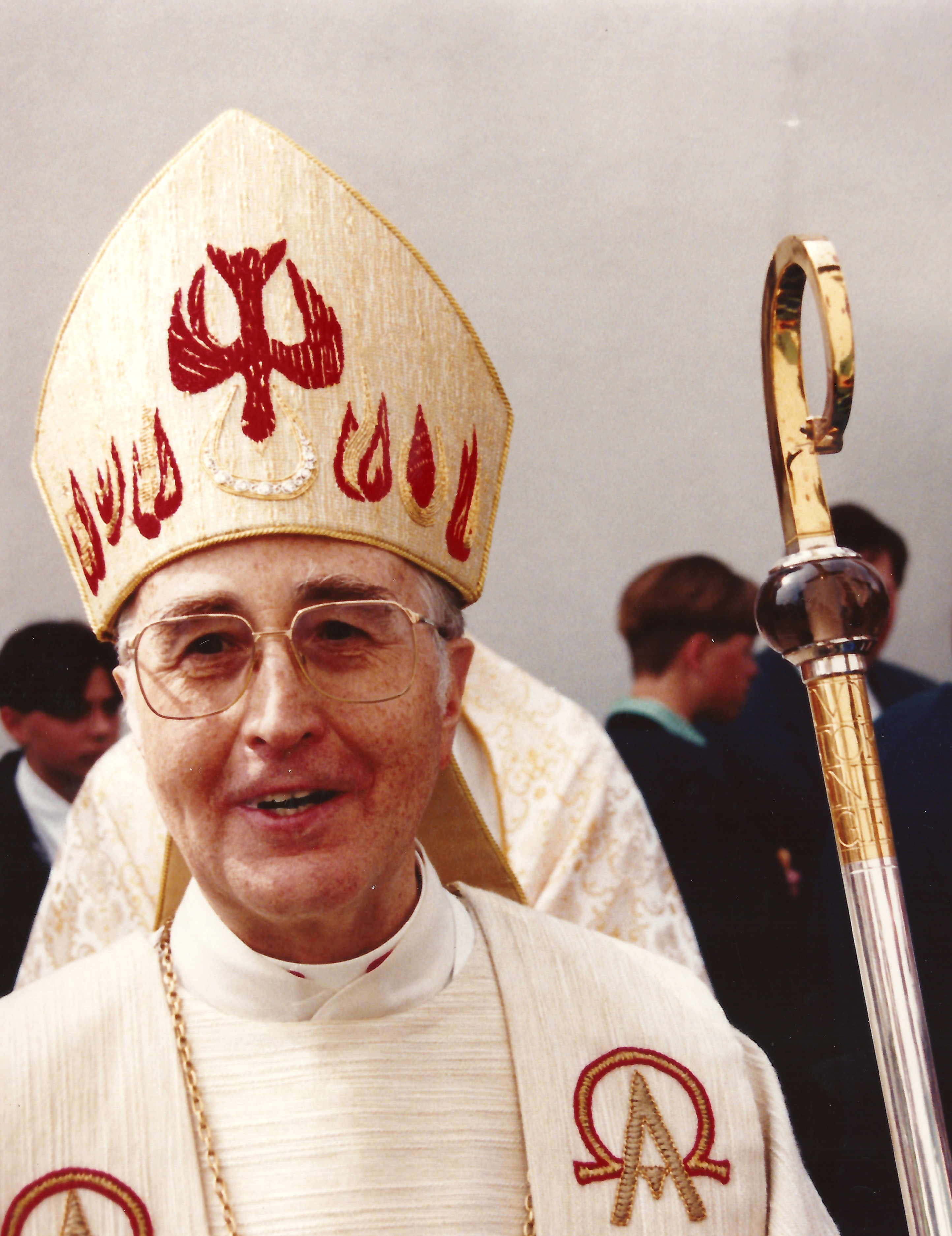 Bamberger Erzbischof Karl Braun